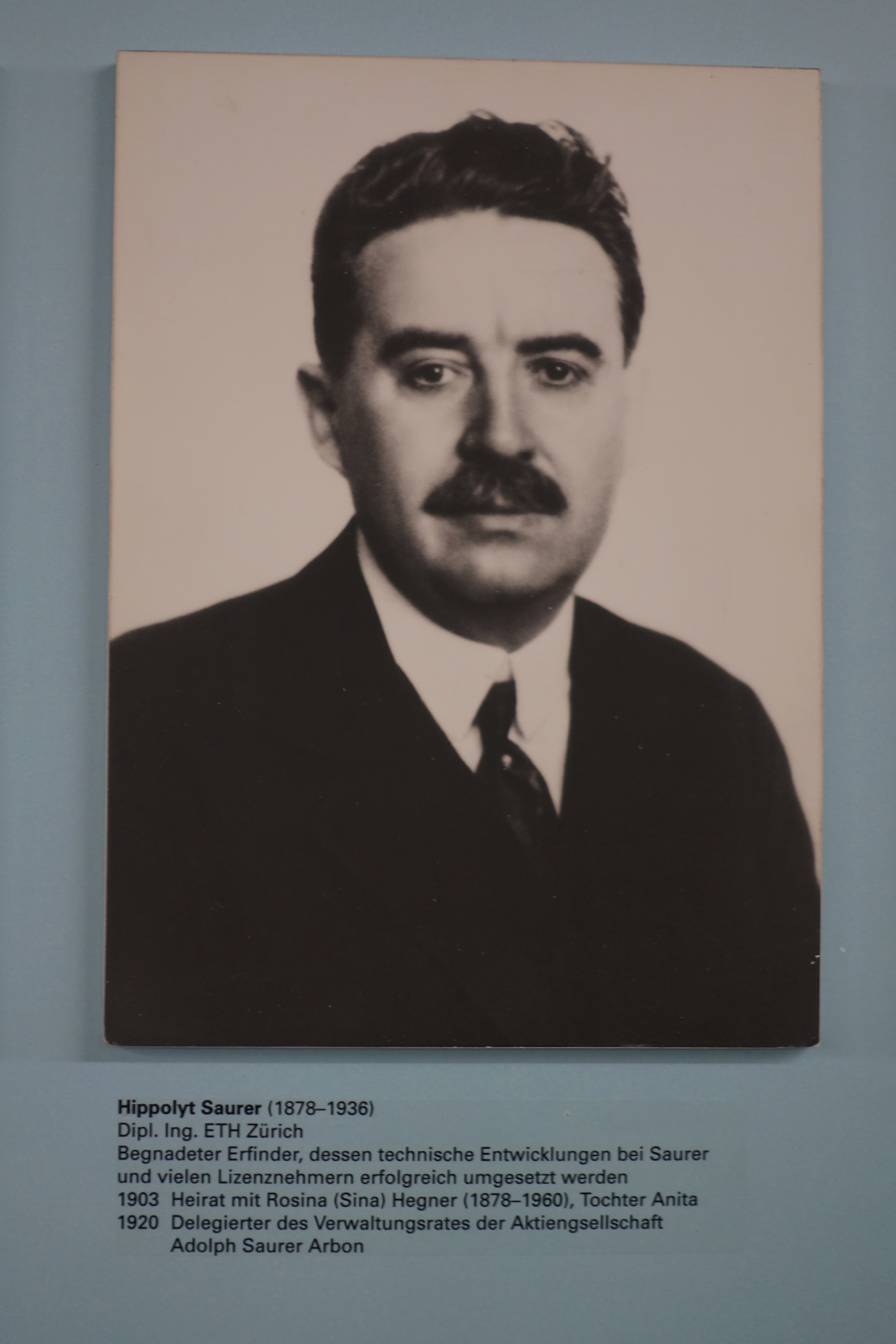 Anton Hippolyt Saurer (1878-1936), Sohn von Adolph Saurer, Schweizer Kaufmann und Fabrikant aus Arbon am Bodensee